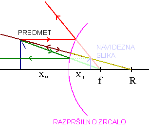 Konveksno/razpršilno zrcalo